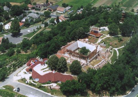 Kaposszentjakab, Hunagry, aerialphotography